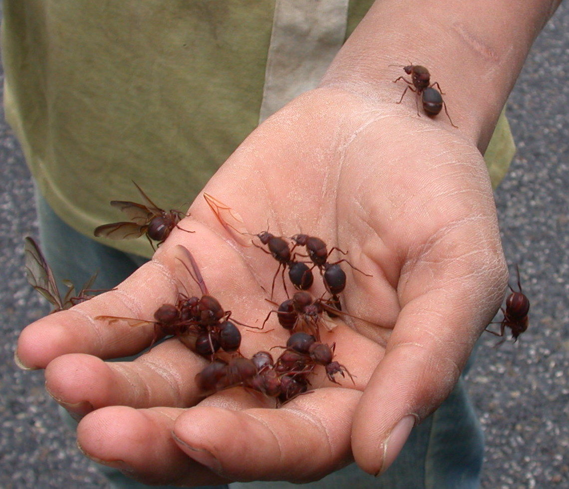 Edible zompopos de mayo